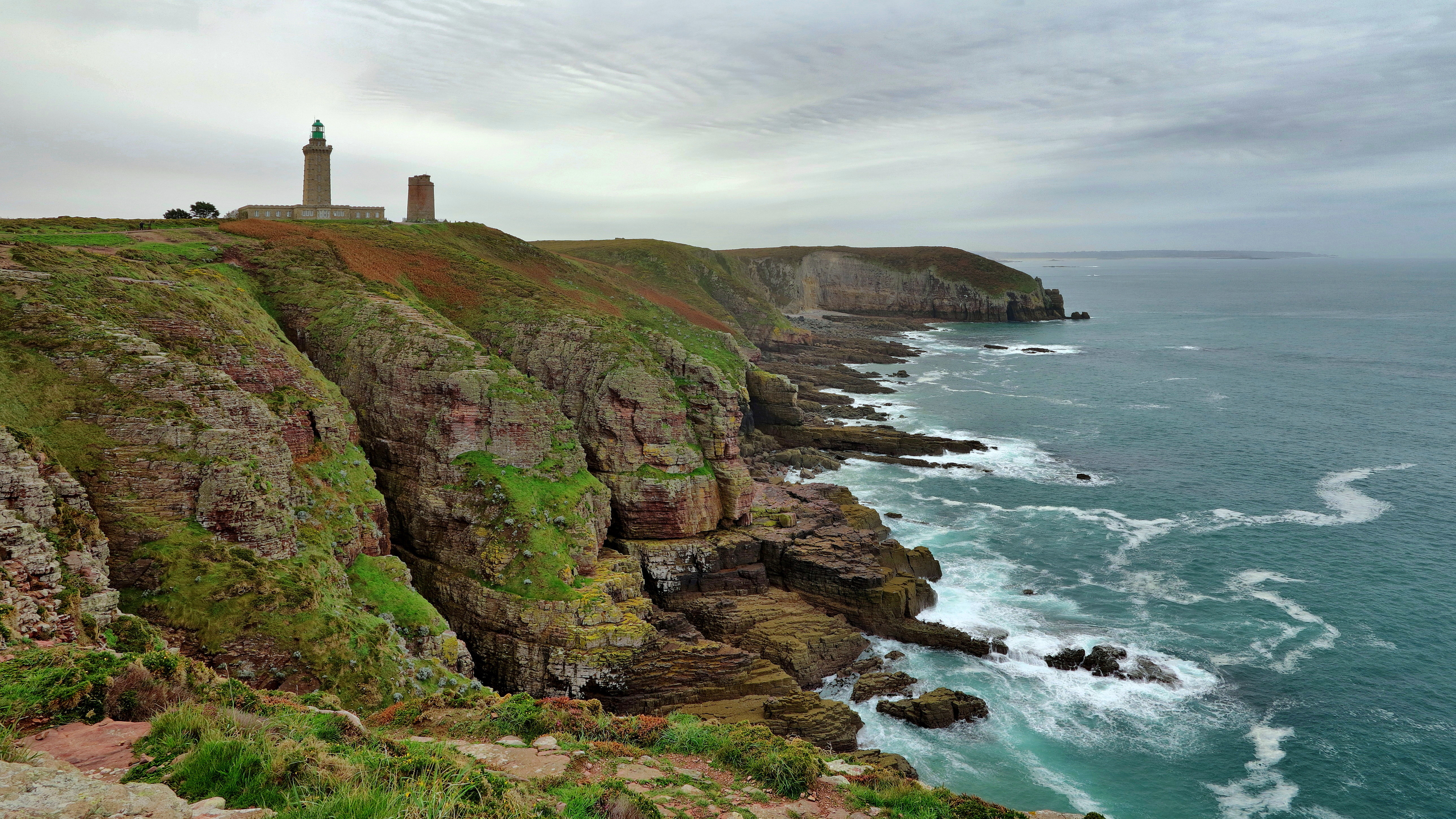 Les phares du Cap Fréhel et la pointe du Jas .